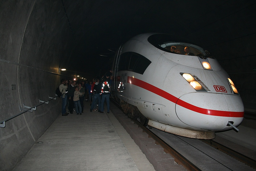 Tunnelrettungsübung im Euerwang-Tunnel am 06.05.2006